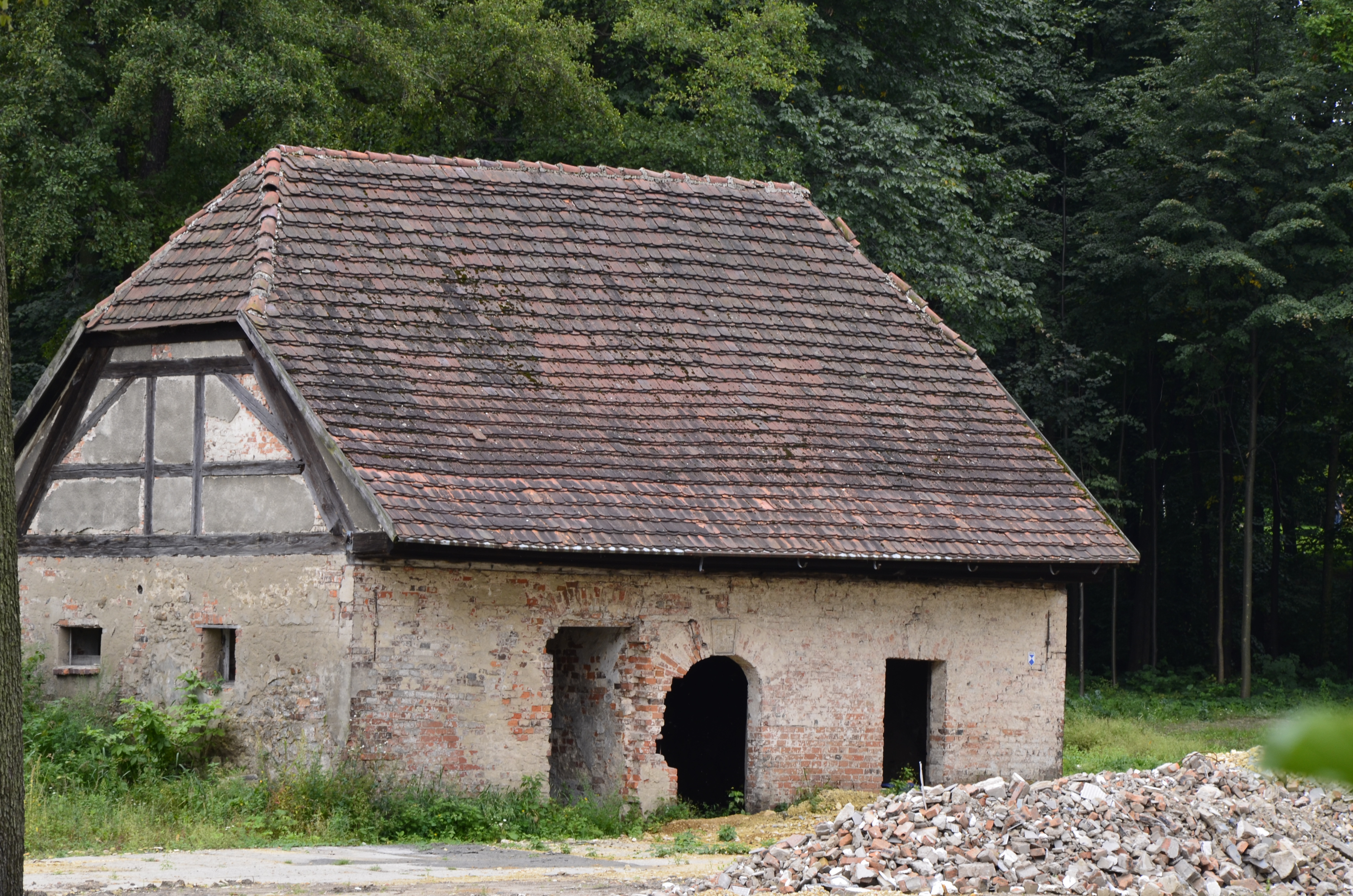 Zespół zabudowy Huty Paprockiej: budynek gospodarczy